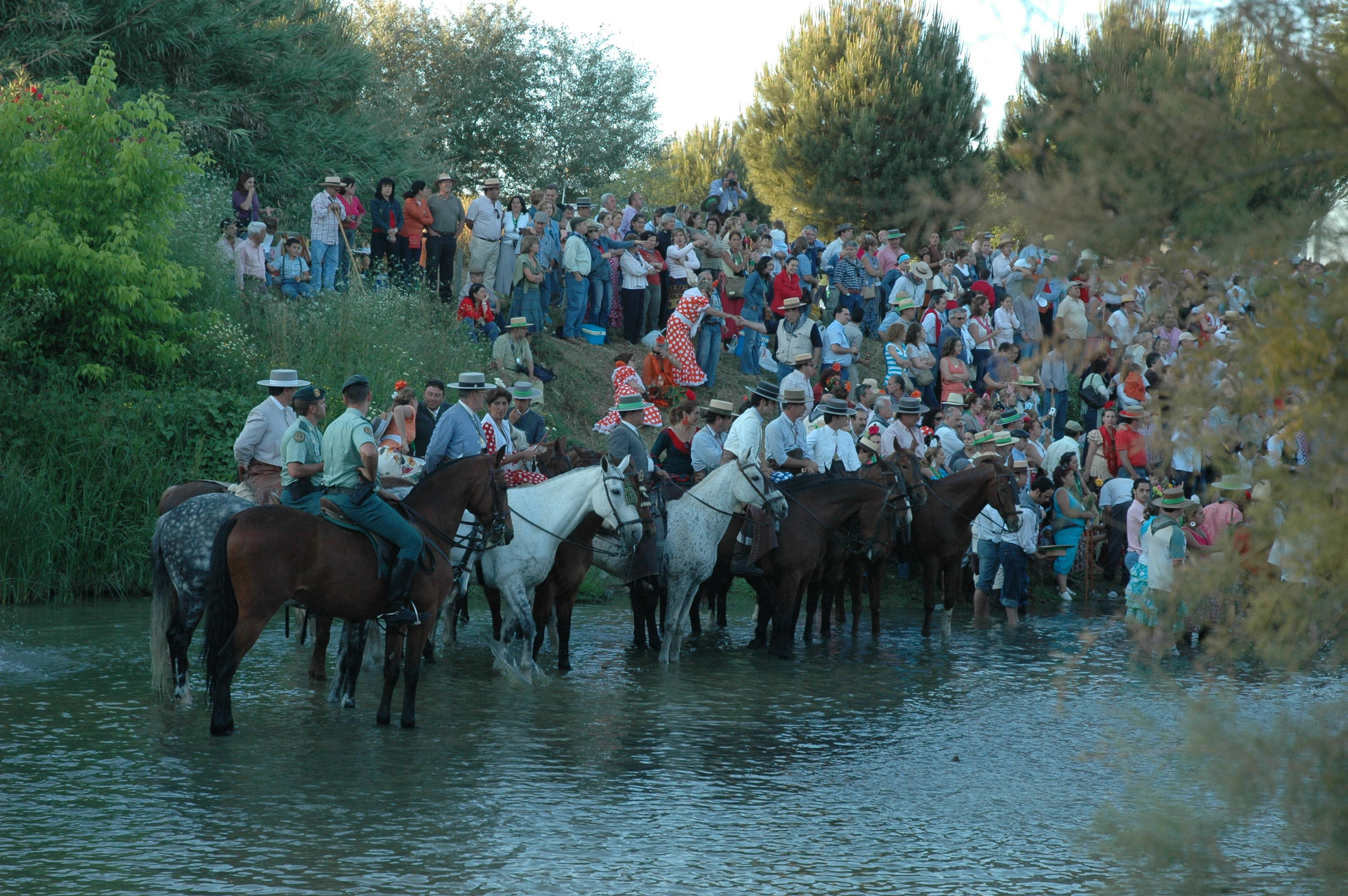 Vado del río Quema. Hermandad de Triana camino de la aldea de El Rocío (Huelva, España).